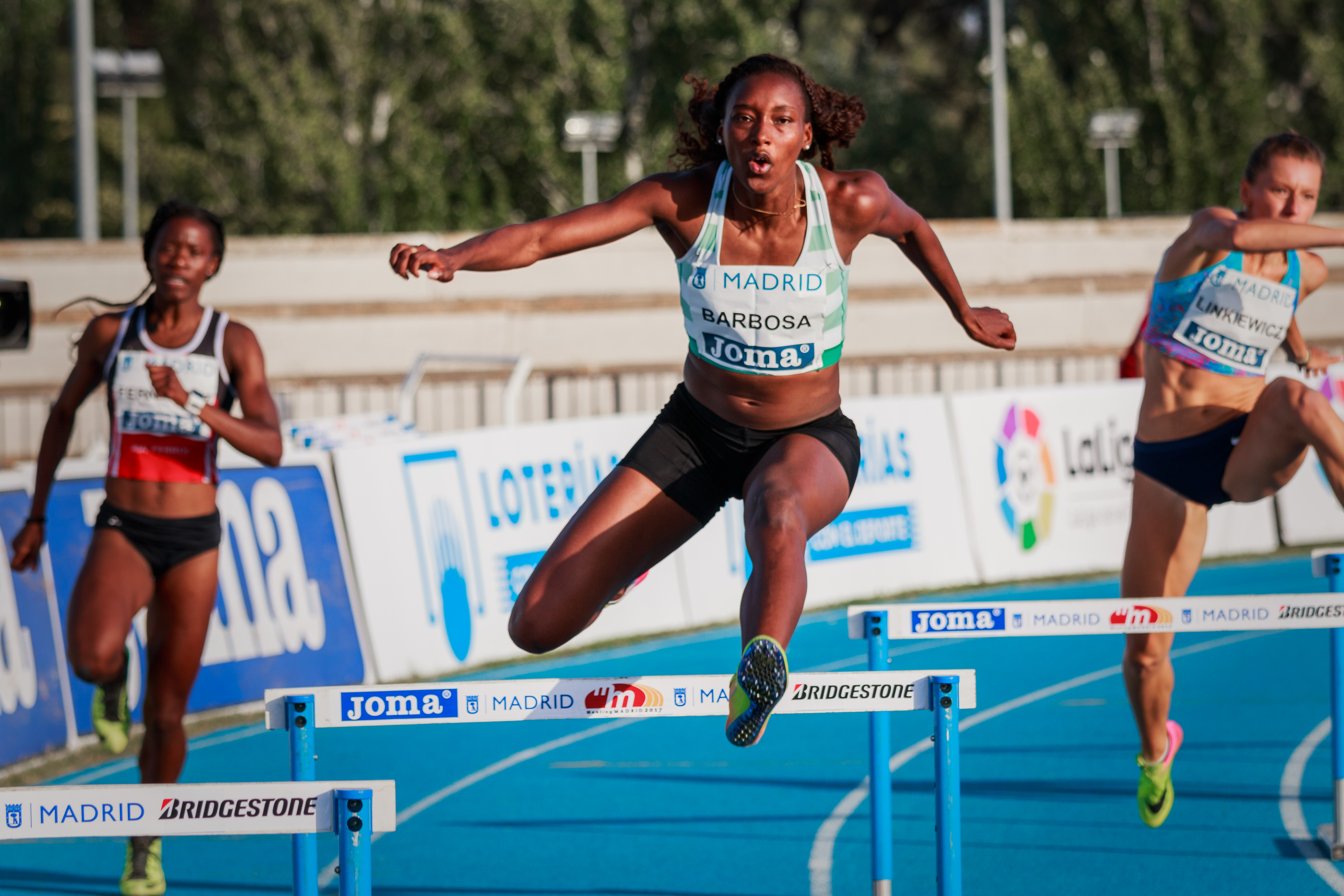 Vera Barbosa (POR). 400m vallas. IAAF World Challenge. Meeting Madrid 2017. Moratalaz, Madrid.